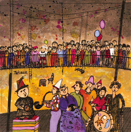 Tatiana Tomàs